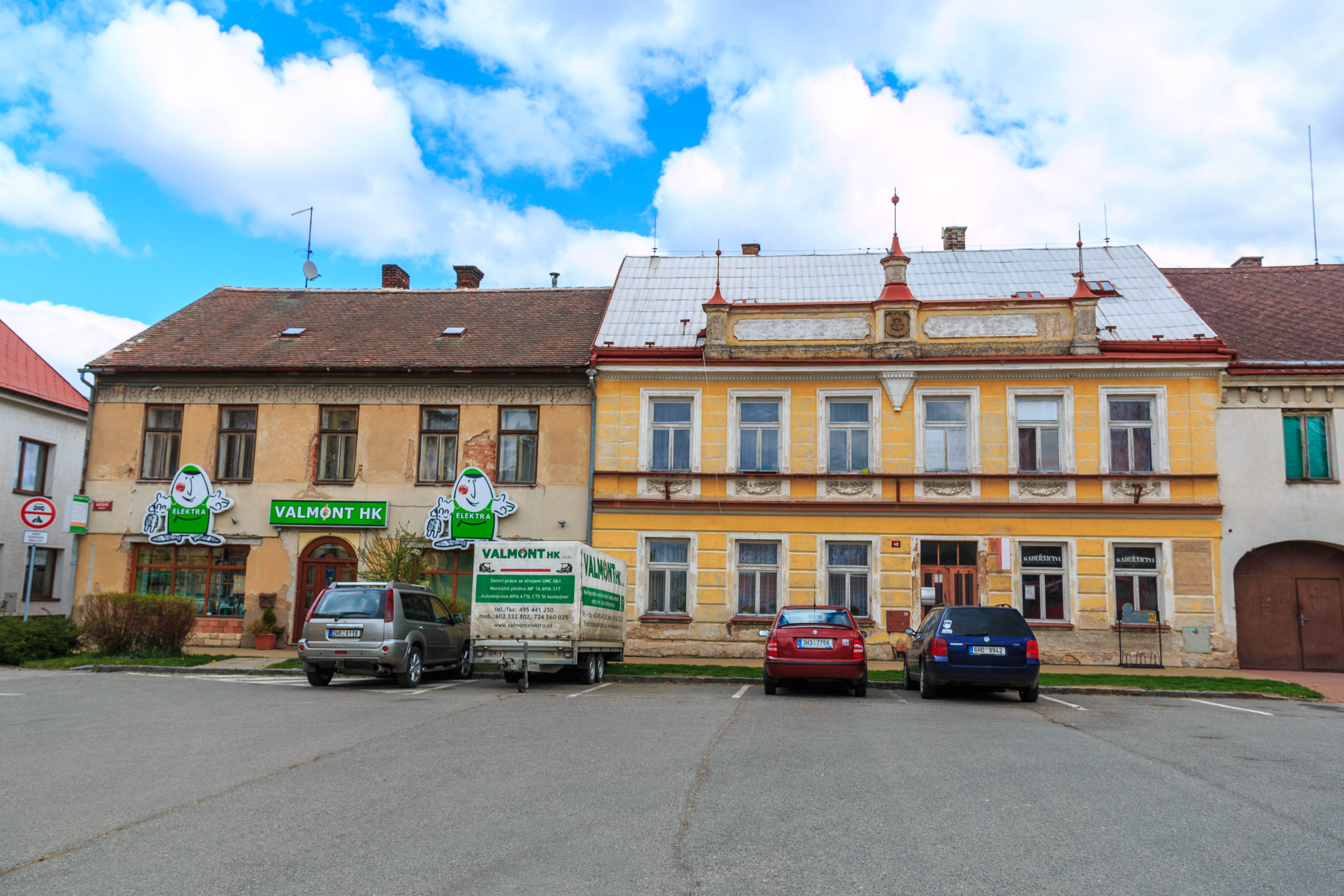 Nechanice stará radnice